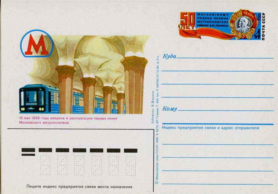 Почтовая карточка СССР - 50 лет московскому метрополитену